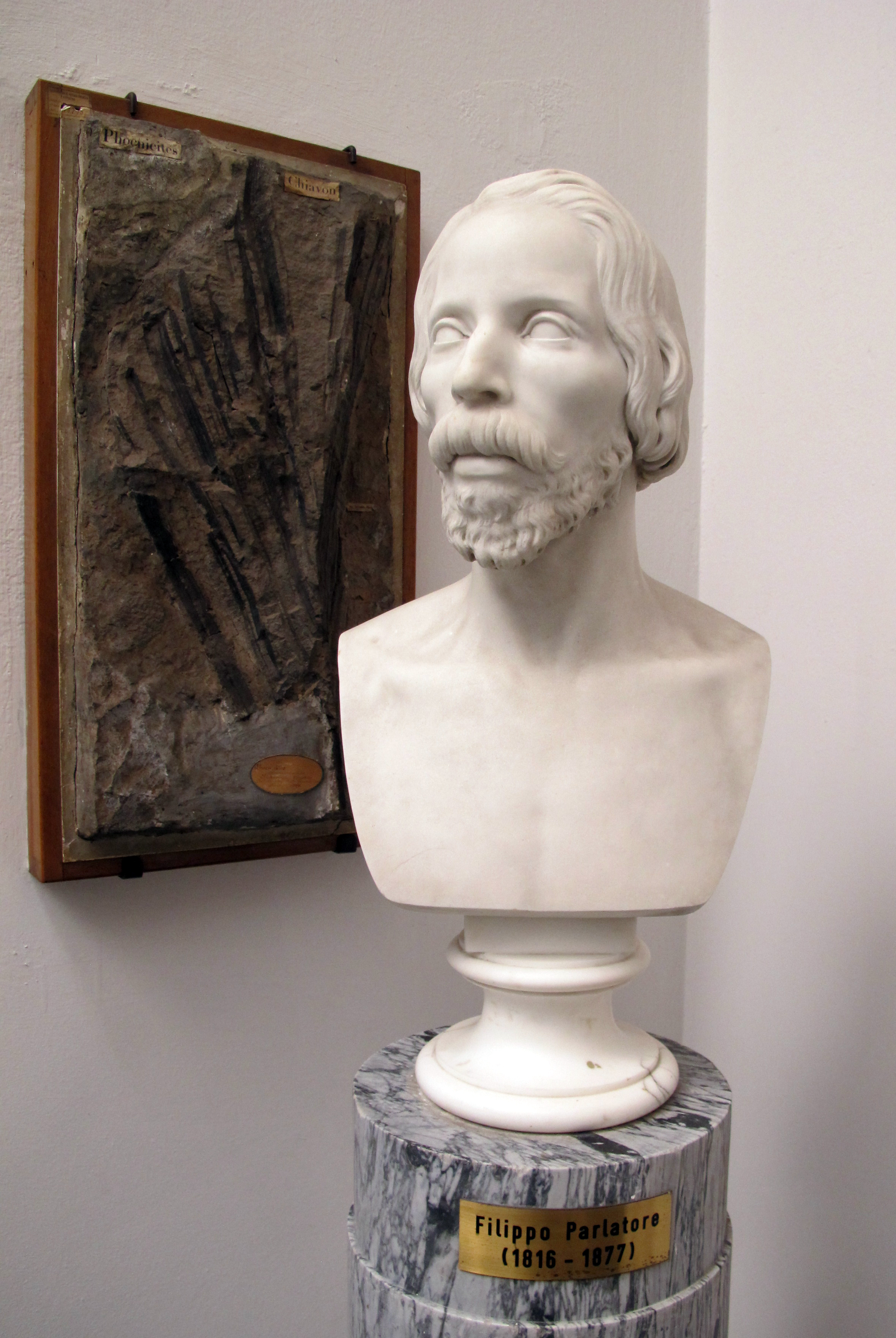 Museo di Storia Naturale, Firenze